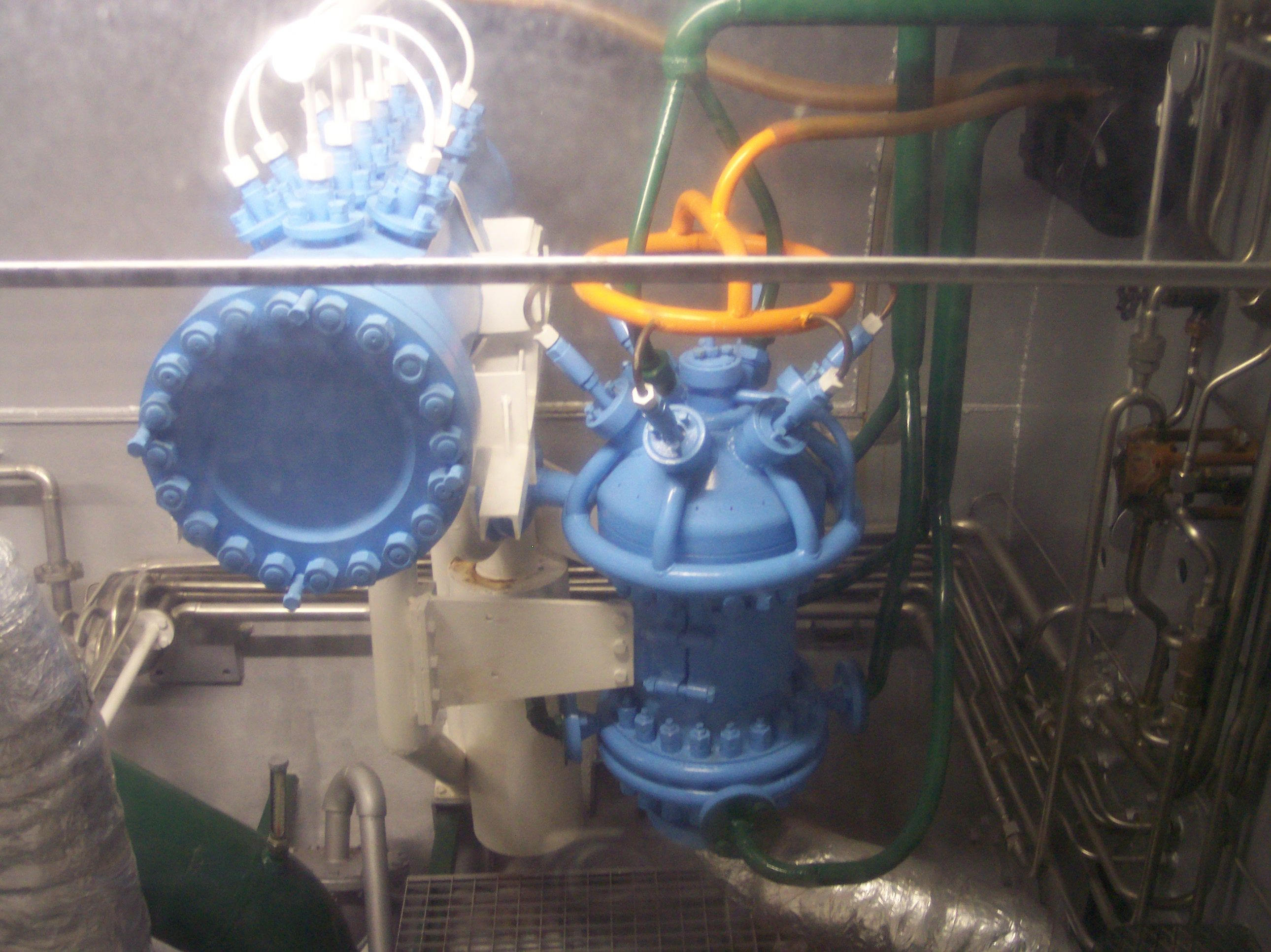 Walter steam generator